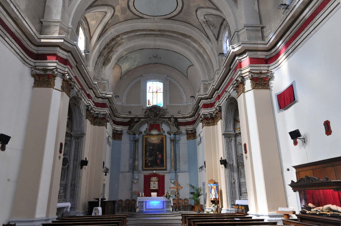 Penne (comune, Italy) 2012